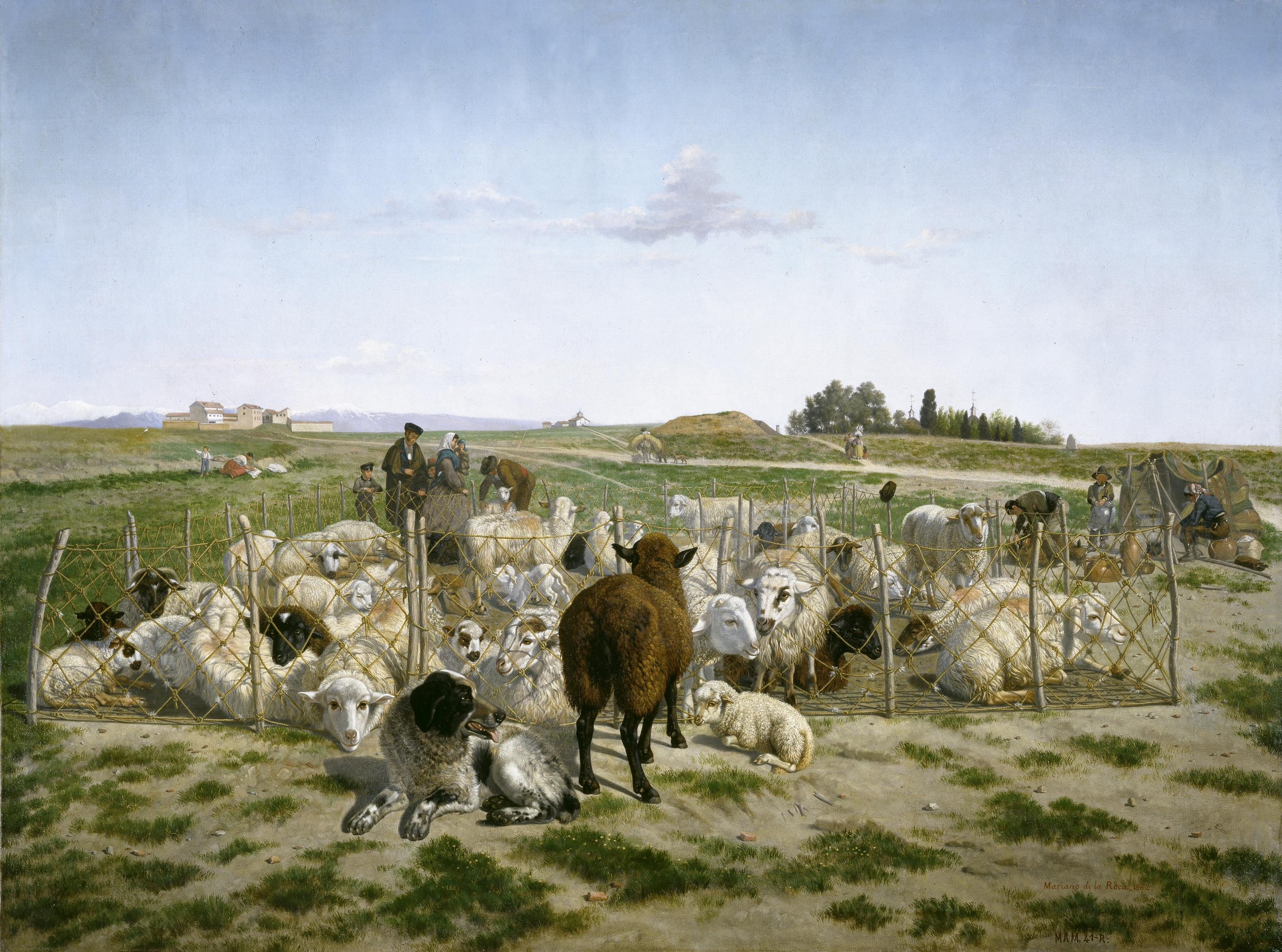 El lienzo, pintado en 1862, muestra un redil de ovejas en las cercanías de la desparecida Puerta de Bilbao de la ciudad de Madrid, (España), que fue derribada en 1865 y también era conocida como Puerta de los Pozos de Nieve.